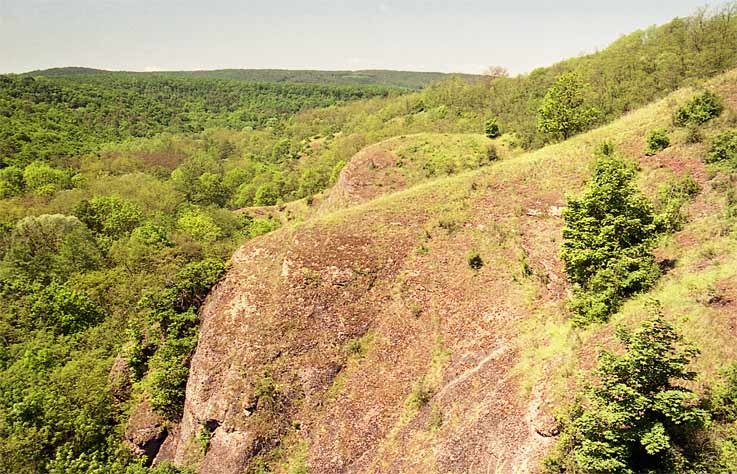 NPR Krumlovskorokytenské slepence - část u osady Rokytná.